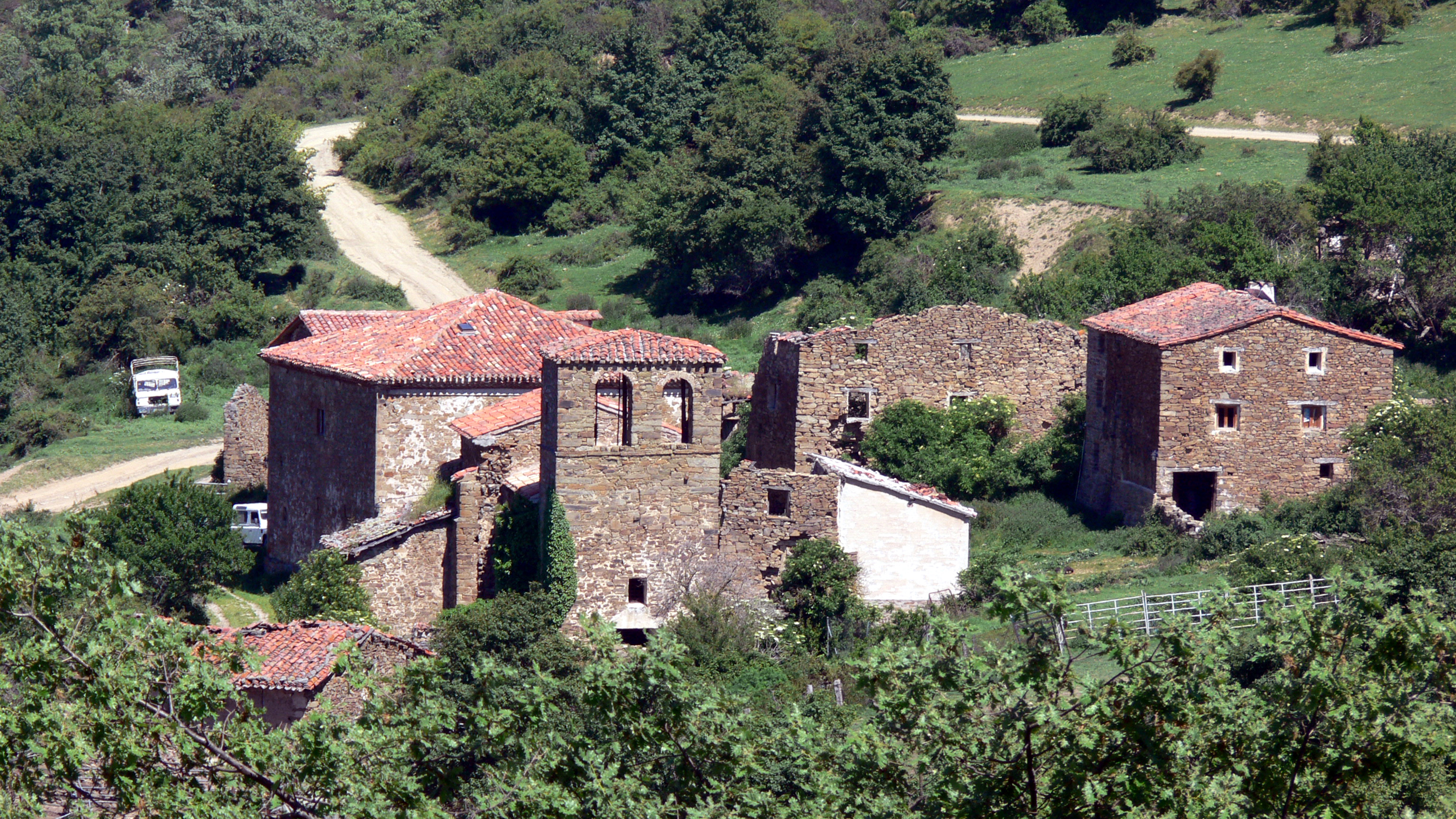 Valdeosera, despoblado de San Román de Cameros en La Rioja (España)